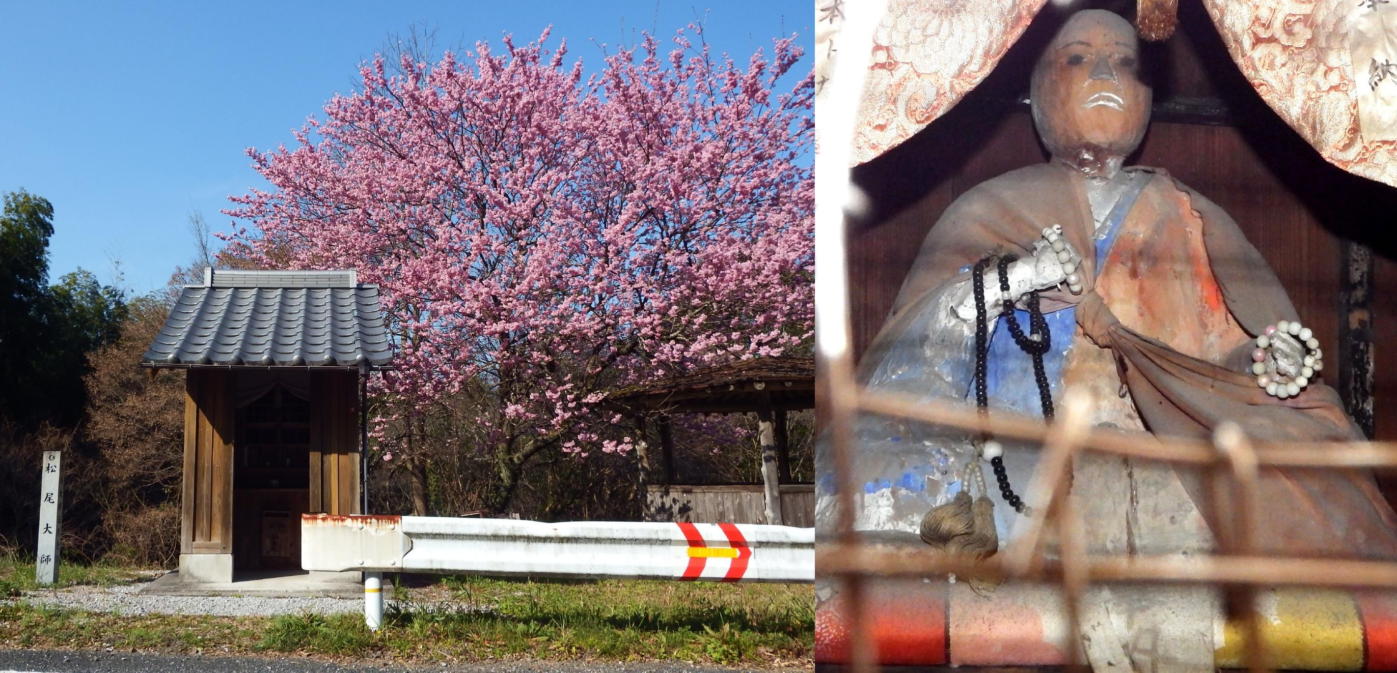 松尾大師堂と大師像